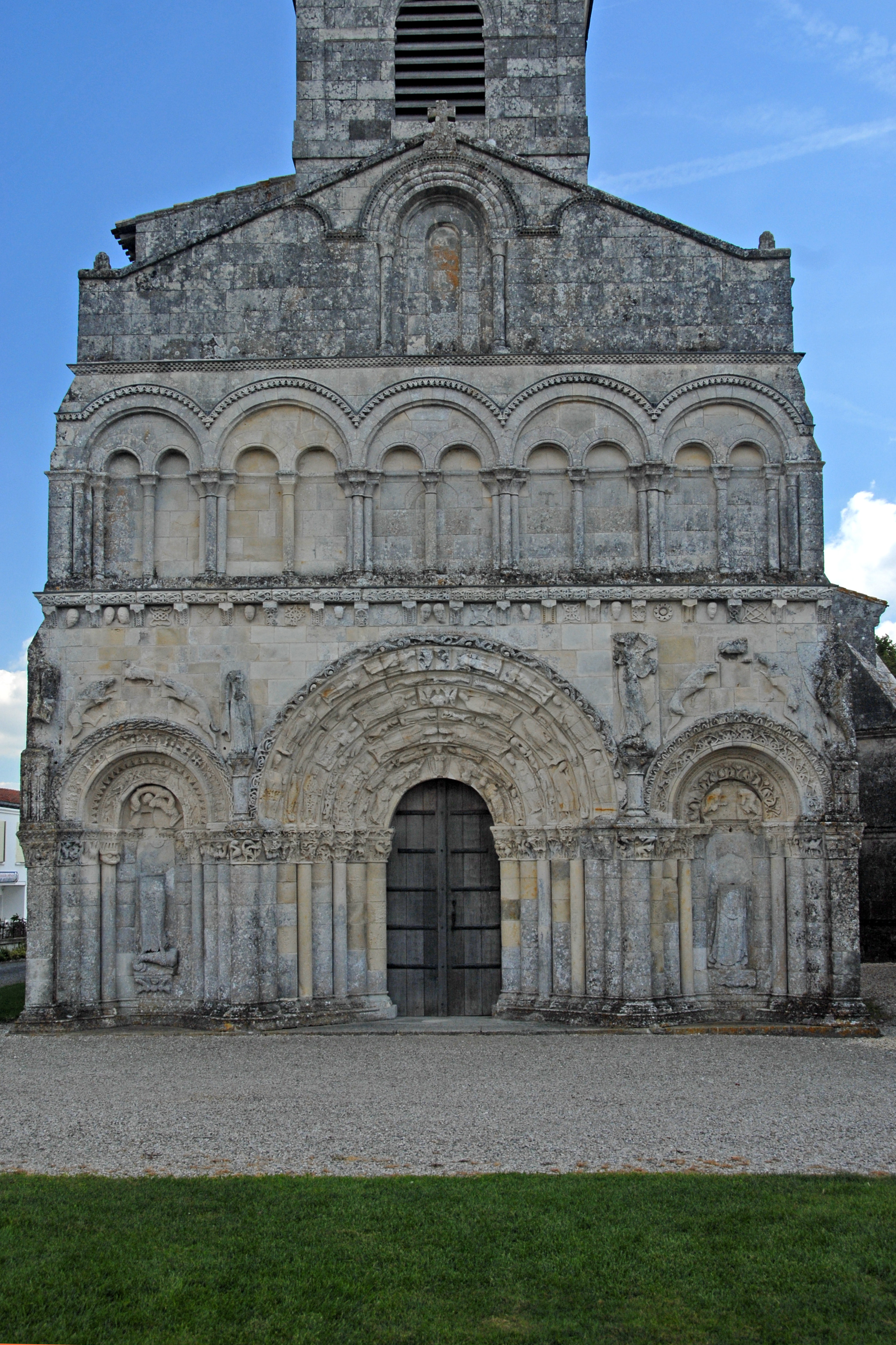 Chadenac, Fassade gesamt